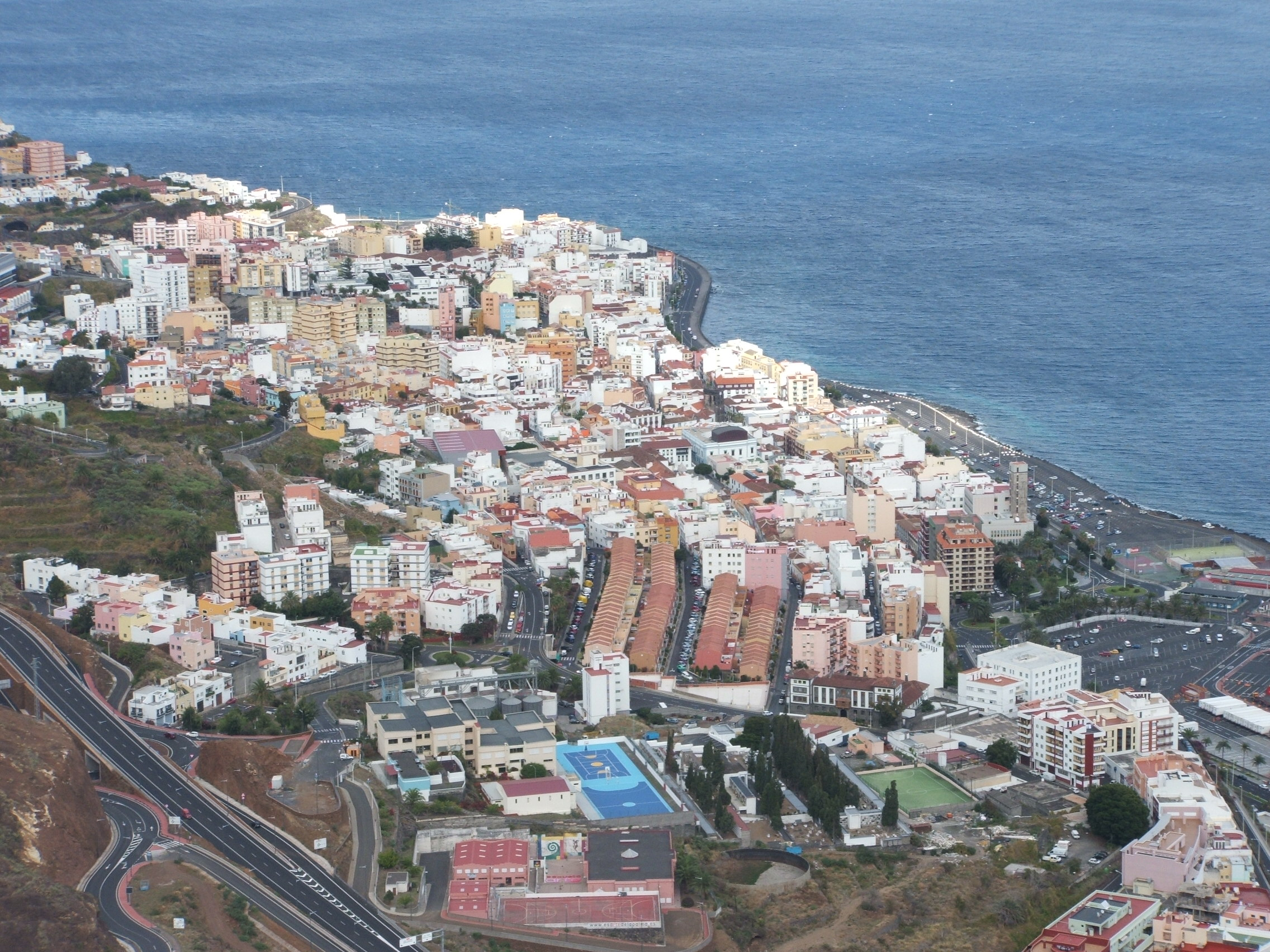 Santa Cruz de la Palma, capital de la isla de La Palma, en Canarias (España).